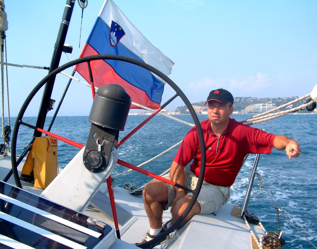 Veliki Viharnik, skipper, Piran, Slovenia. K. Korlević